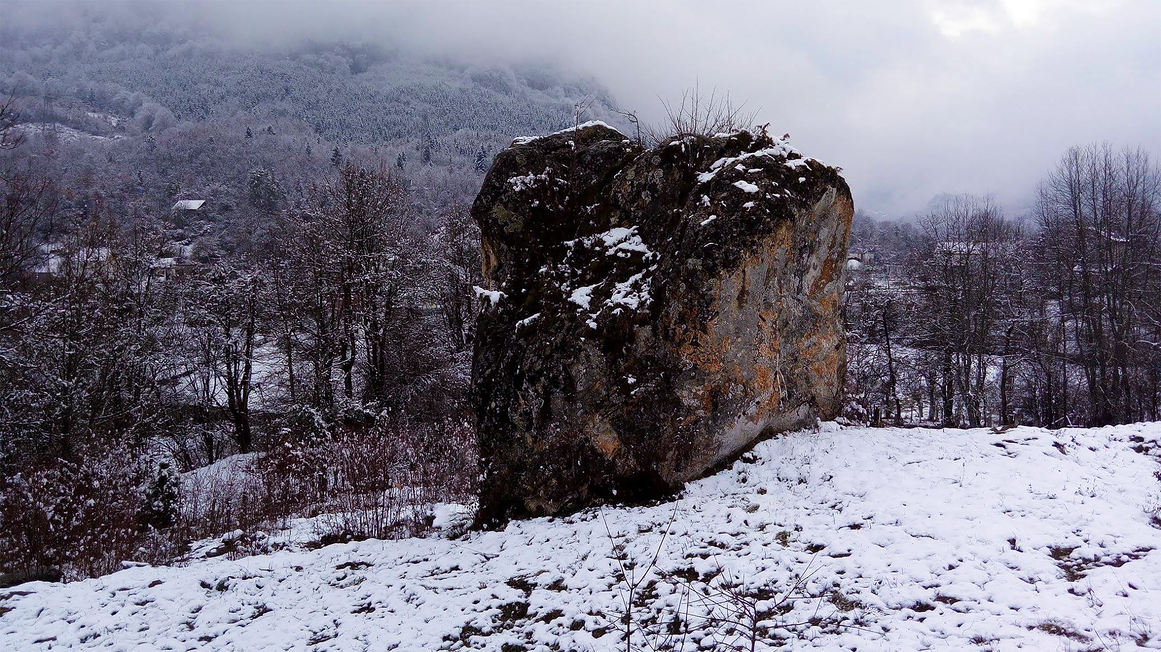 Kripta u selu Rataji kod Miljevine (Foča) - arheološko područje Rataje.